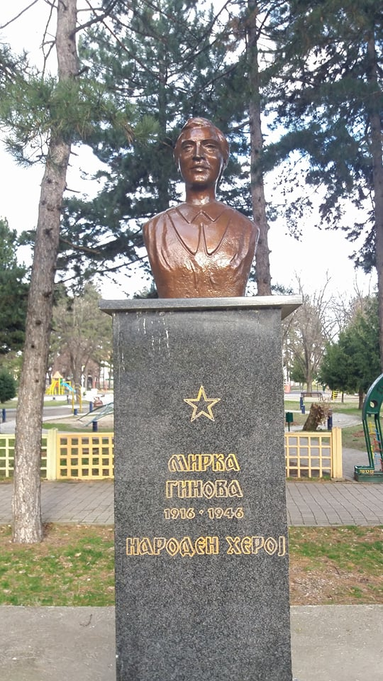 Statue of Mirka Ginova in Bitola